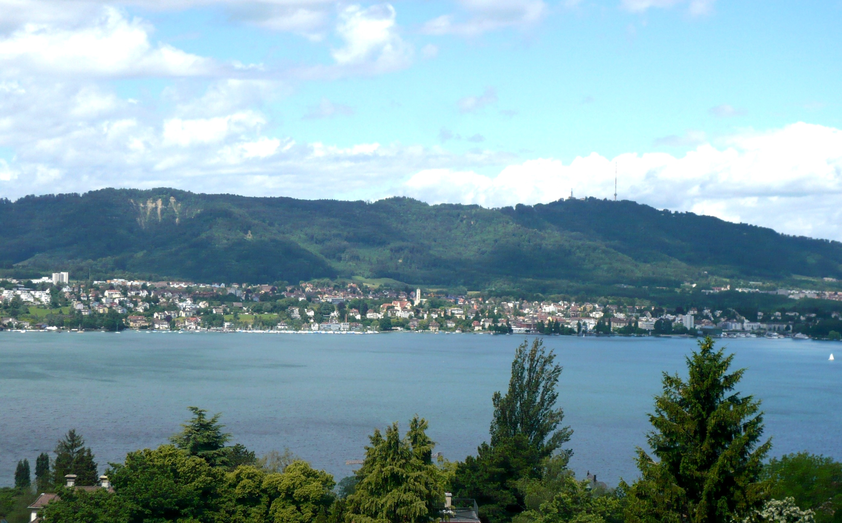 Wollishofen mit Üetliberg